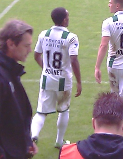 Lorenzo Burnet bij FC Groningen